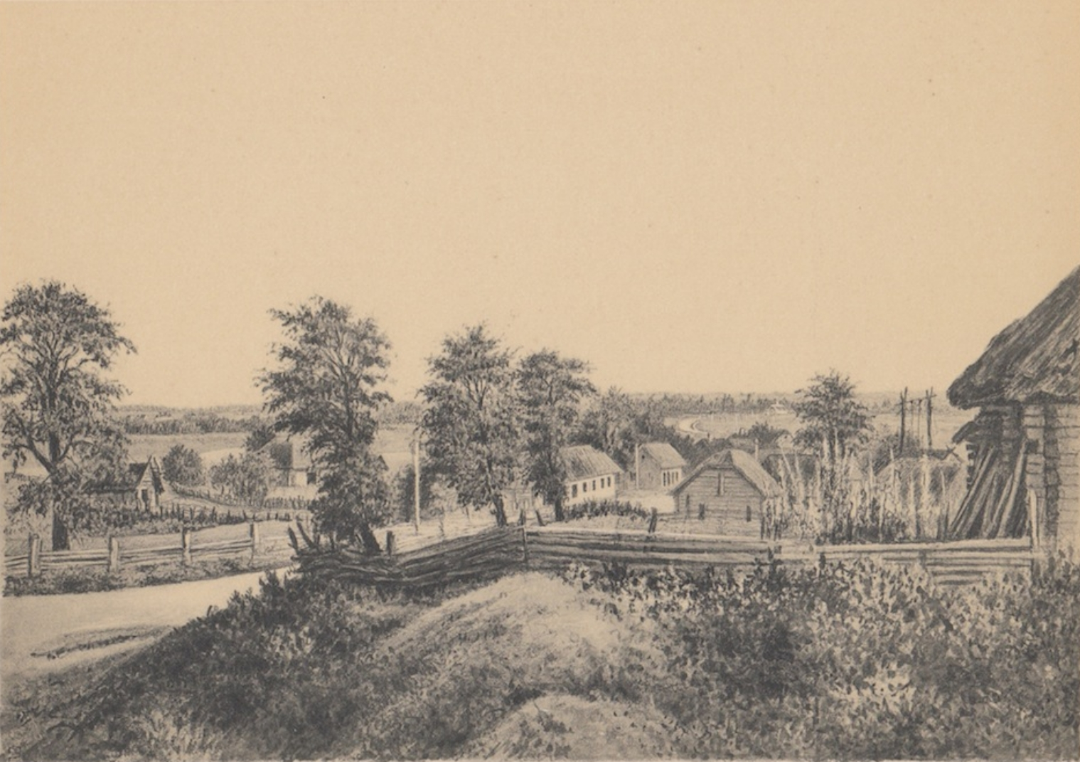 Wilhelm Siegfried Stavenhagen: Neues Album baltischer Ansichten. Mit der Zeichnung des Dorfes "Kurschkönigen" aus dem Jahr 1861Latviešu: Vilhelms Zigfrīds Štafenhagens: Jaunais albums baltisku skatu. Ar "Kuršu ķoniņu ciema" attēlam; zīmējums 1861 g.